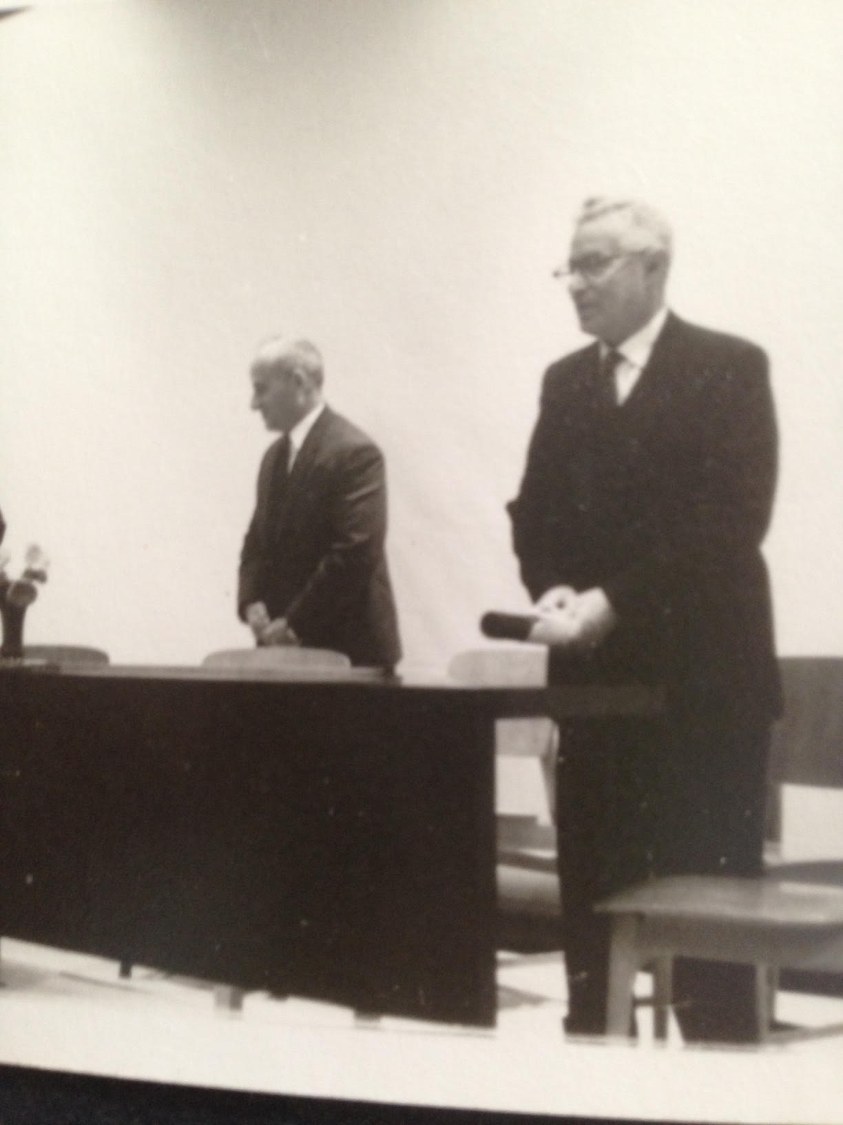 יחזקאל ריבנאי נושא את הרצאת השנה במכון וולקני בנושא "נדידה ופנולוגיה של פרפרים בארץ"